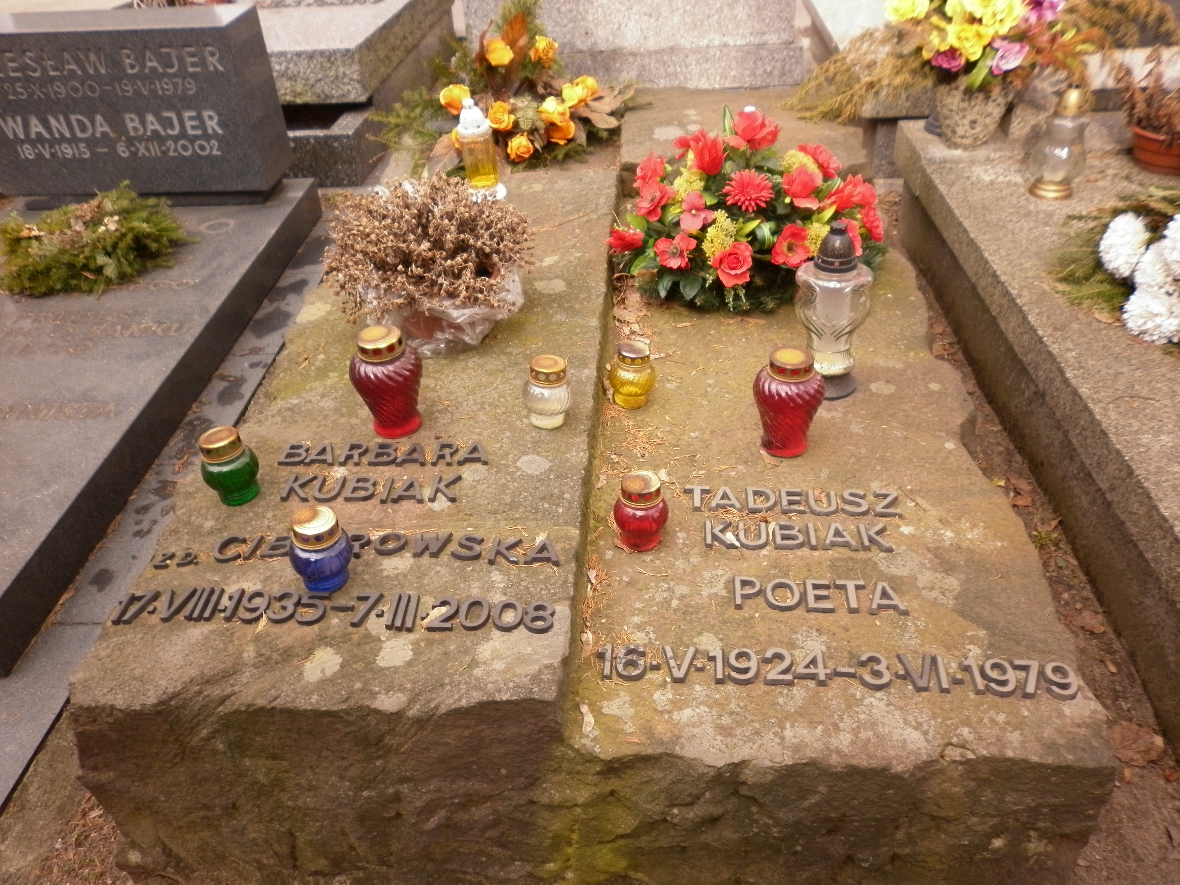 Grób Tadeusza Kubiaka na Cmentarzu Wojskowym na Powązkach